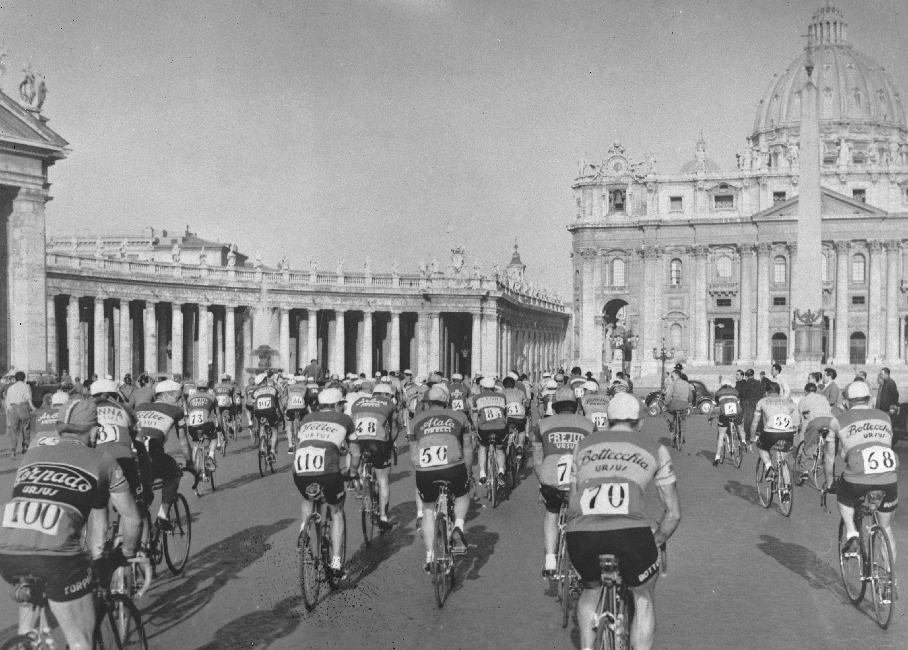 Ronde van Italie. De renners verlaten Rome